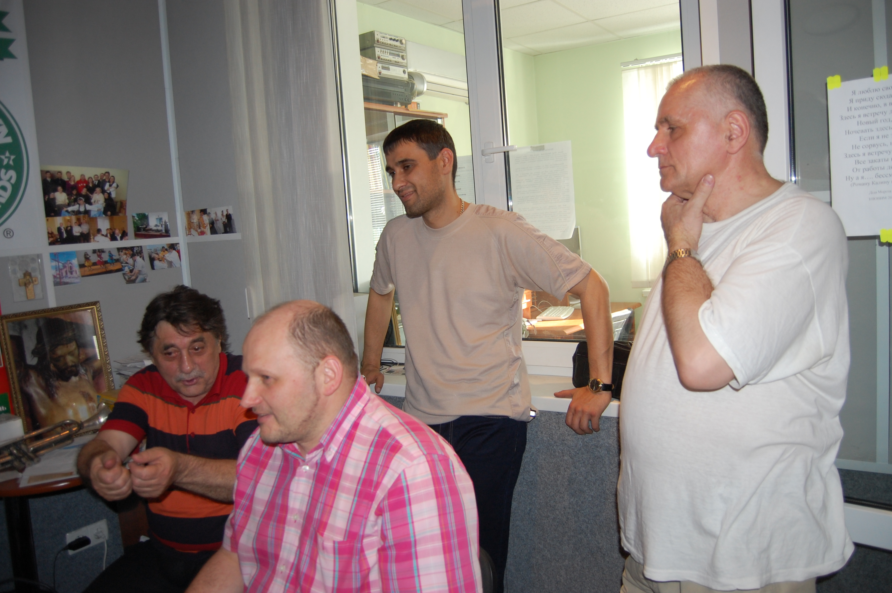 Композитор Володимир Домшинський, аранжувальник Роман Калин та співак Василь Михайлович під час роботи над піснями про Небесну Сотню у студії «Дзвони» (2014 рік).